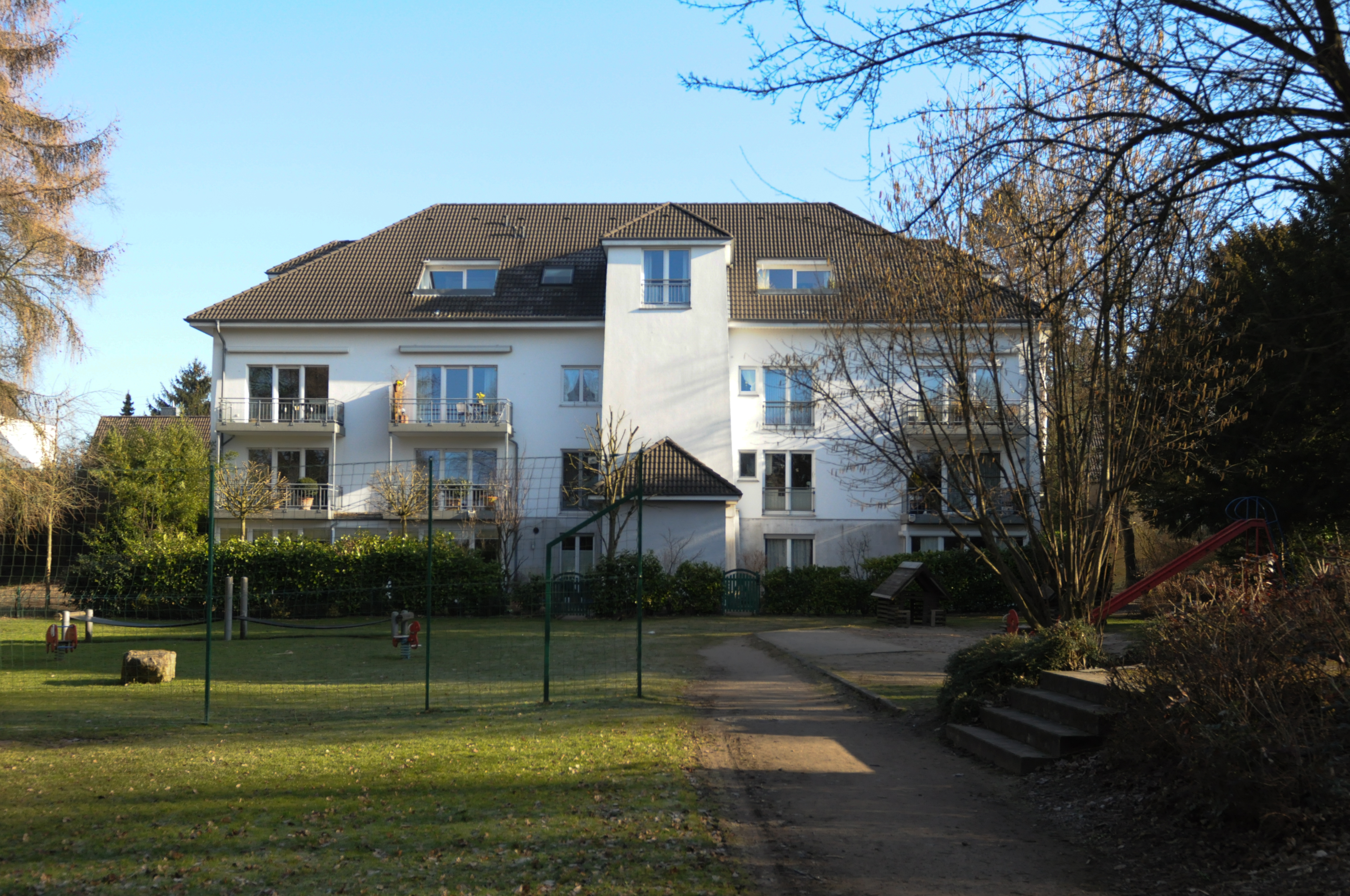 Westfalenweg, Wuppertal